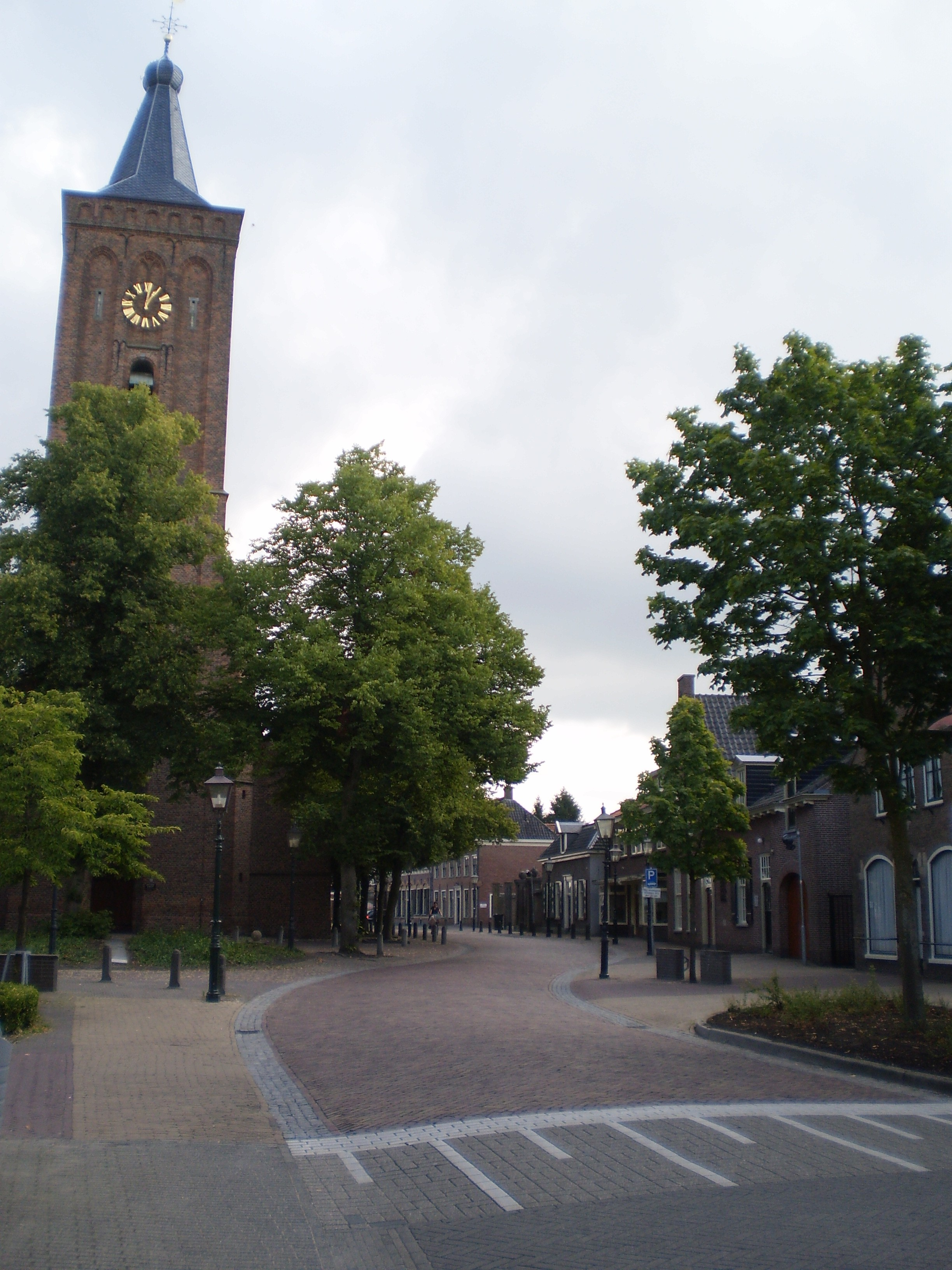 Buorren Scherpenzeel